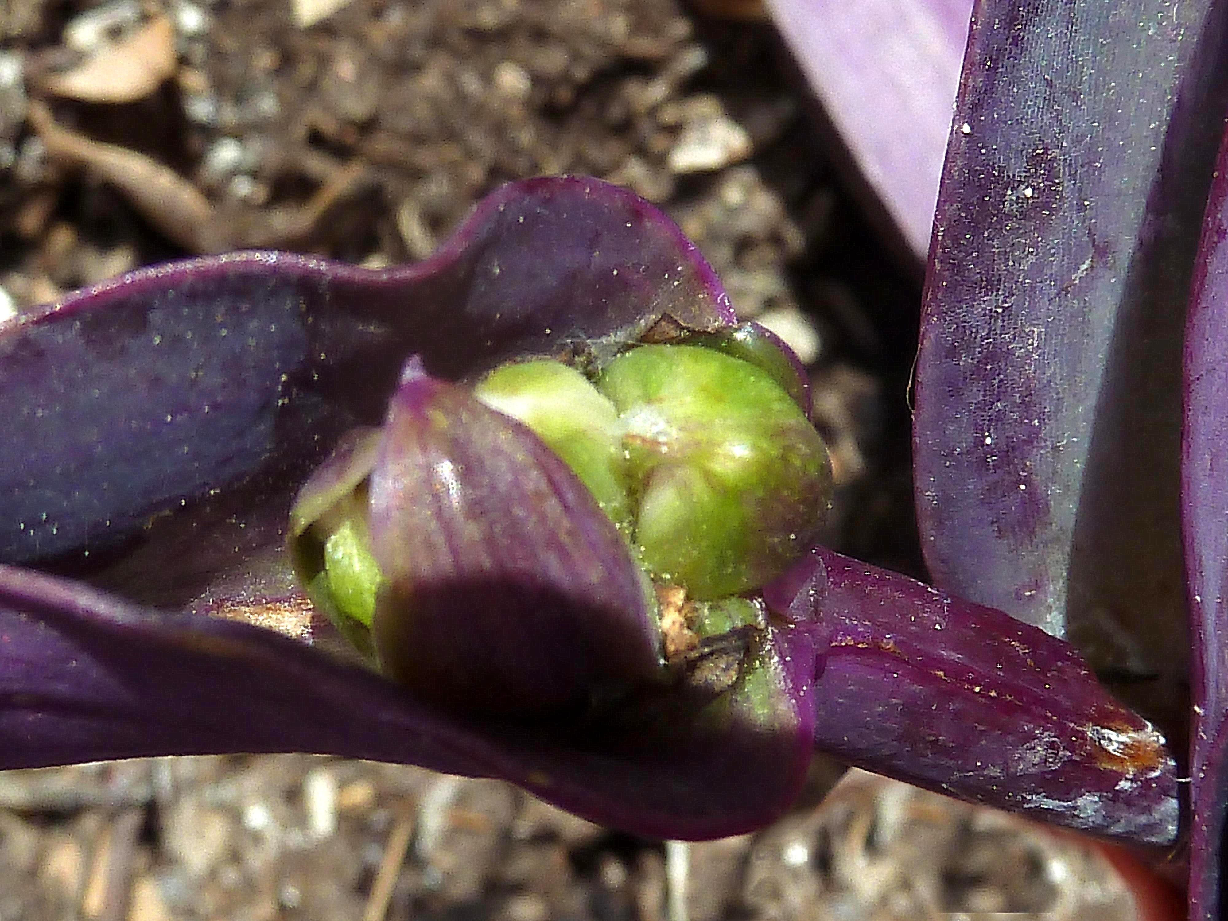 Tradescantia pallida (Purpurina) - Preantesis. - Cultivado/ornamental, José Cucú, Albatera, Provincia de Alicante (España).